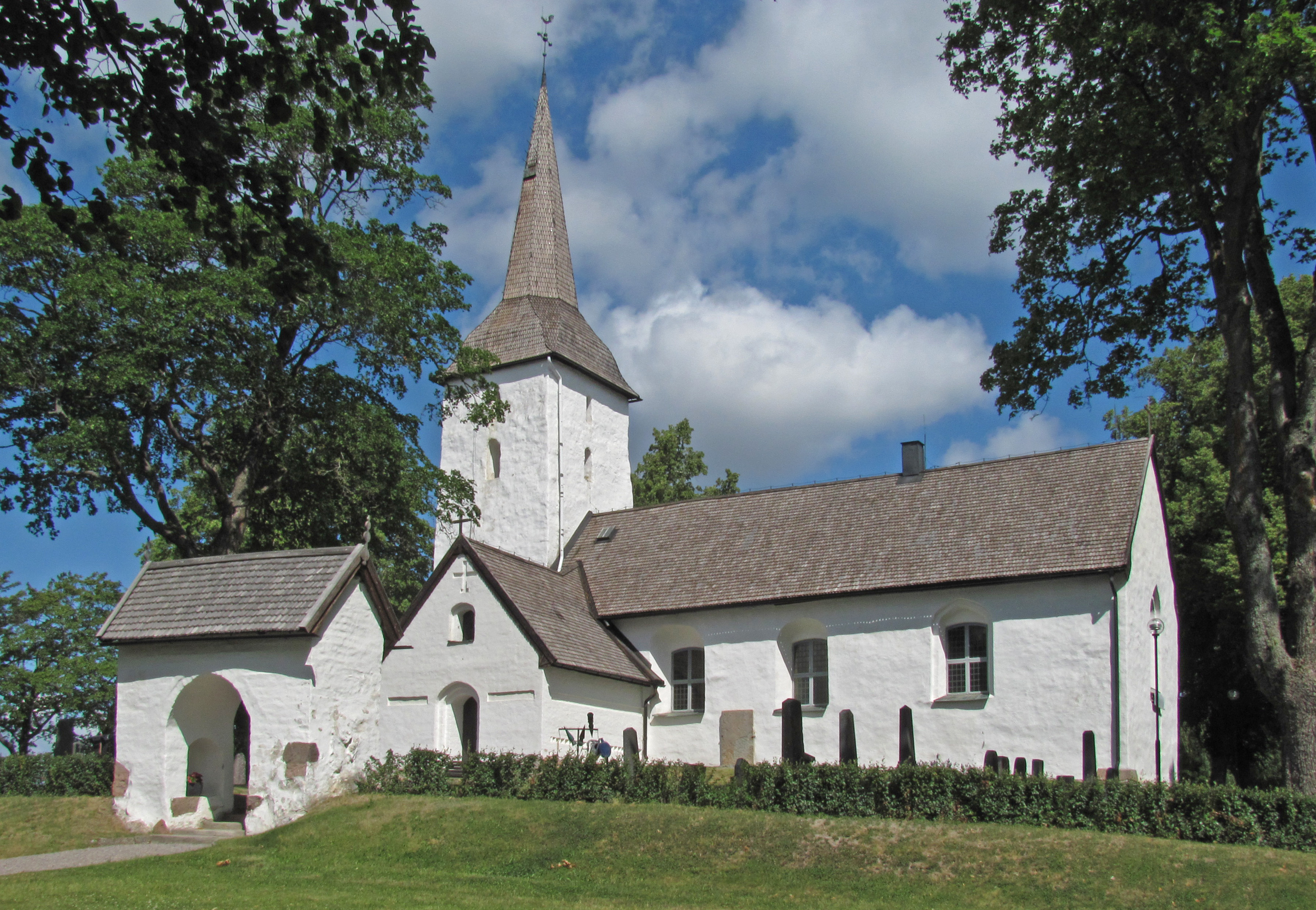 Vallby kyrka, Södermanland